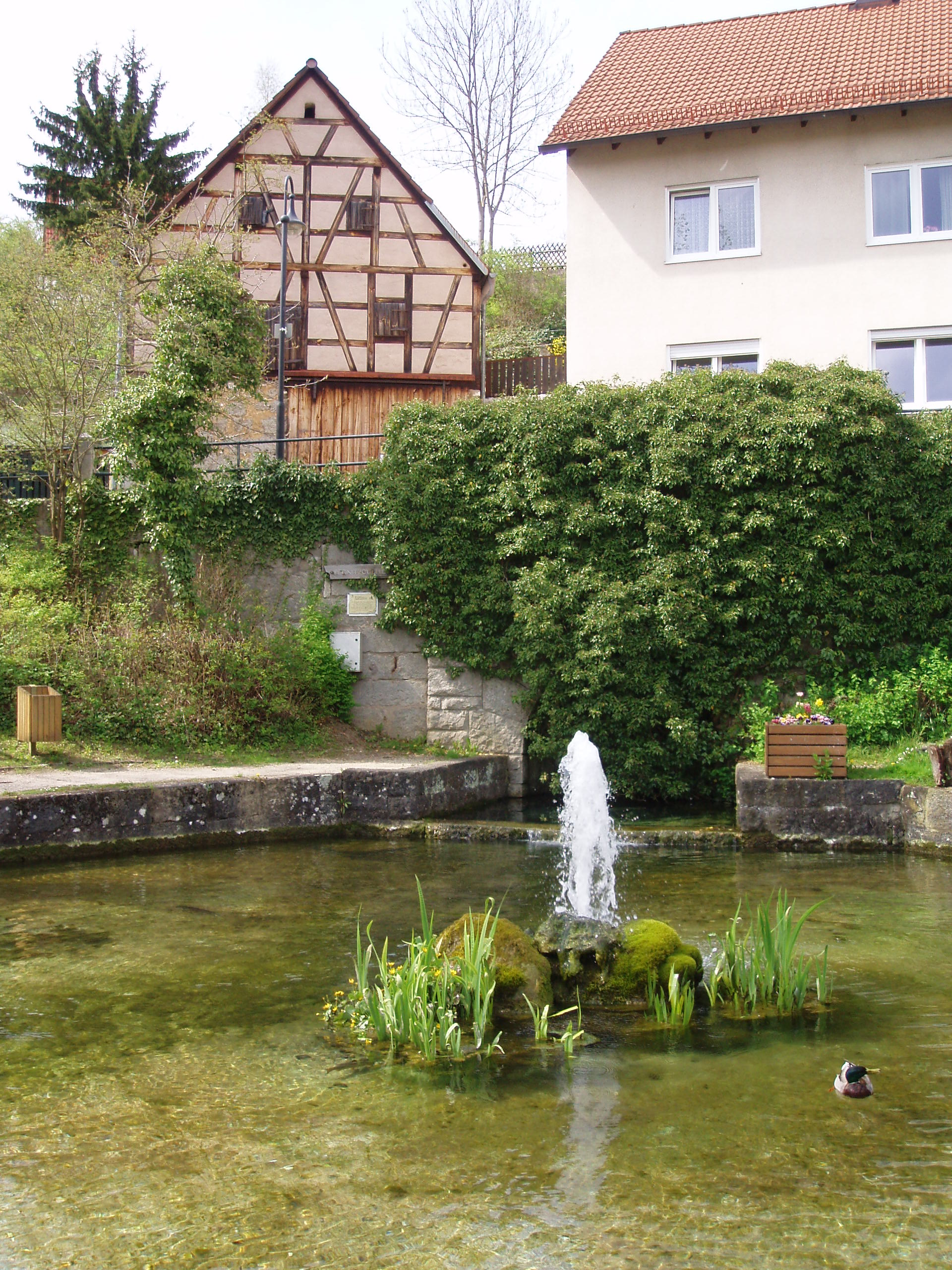 Karstquelle des Flusses Pegnitz in der Stadt Pegnitz, Fränkische Schweiz.